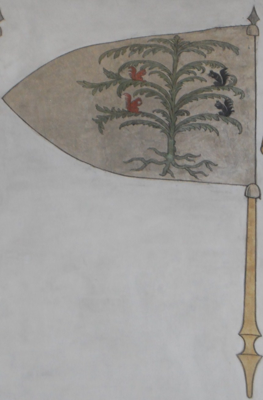 Schlachtbanner des Hauensteiner Landfahnen bei der Schlacht bei Sempach in der Franziskanerkirche Luzern. Das bei der Schlacht bei Sempach verlorene Schlachtbanner des Hauensteiner Landfahnens wurde als Beute der Luzerner in die dortige Barfüsserkirche (heute Franziskanerkirche) gebracht. Dort hing das Original zusammen mit weiteren erbeuteten Schlachtbannern bis der Zahn der Zeit so sehr daran genagt hatte dass man sich dazu entschloss die Banner abzunehmen und auf Holztafeln originalgetreu abzumalen. Auch an die Stelle im Kirchenschiff wo die Banner einst hingen malte man eine Kopie des Hauensteiner Schlachtbanners. Diese Kopie ist leider nicht so getreu gefertigt worden wie die Holztafeln und so sieht man heute eine recht karge Tanne an der lediglich 4 der sonst 8 üblichen Eichhörnchen, welche die Einungen representieren, aufsteigen. Die angesprochenen Holztafeln sind leider nicht öffentlich zugänglich.